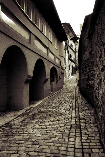 Pfaffengasse – Eine der recht steil ansteigenden Passauer Gassen